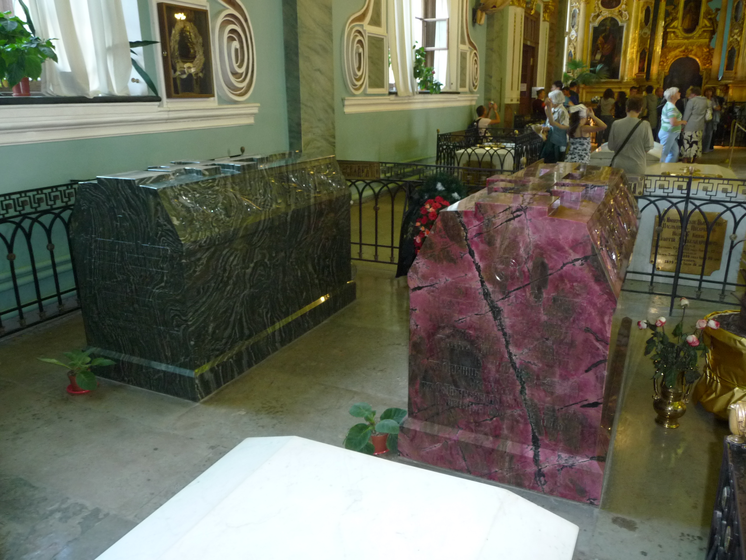 RussianTzarsTumbs-p1030582.jpg